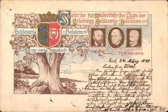 Gelaufene Postkarte zum 50. Jahrestag Bildung der Provisorischen Regierung in Kiel am 24. März 1848